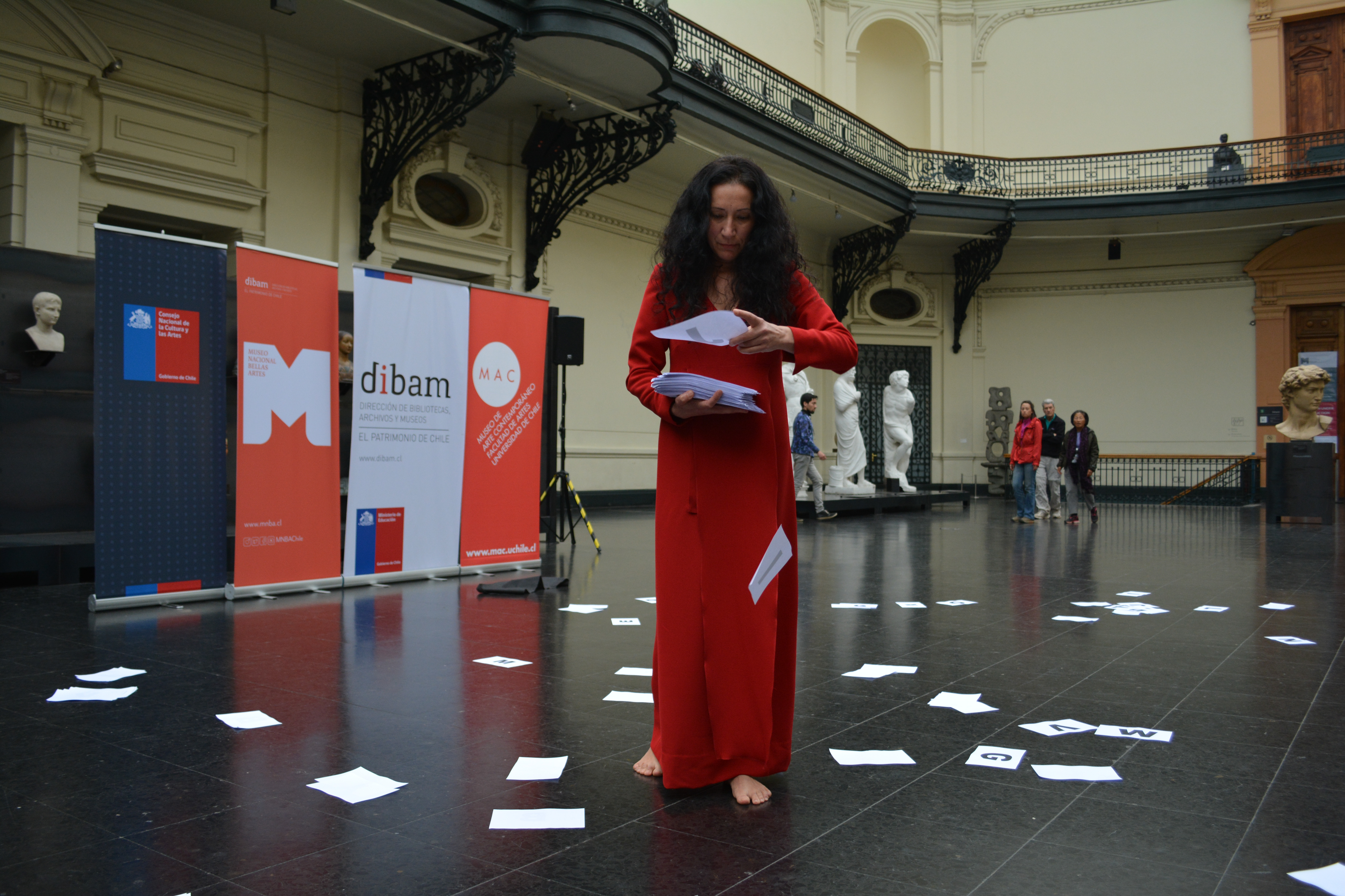 Editatón de Mujeres Artistas, Museo Nacional de Bellas Artes, Santiago, Chile.